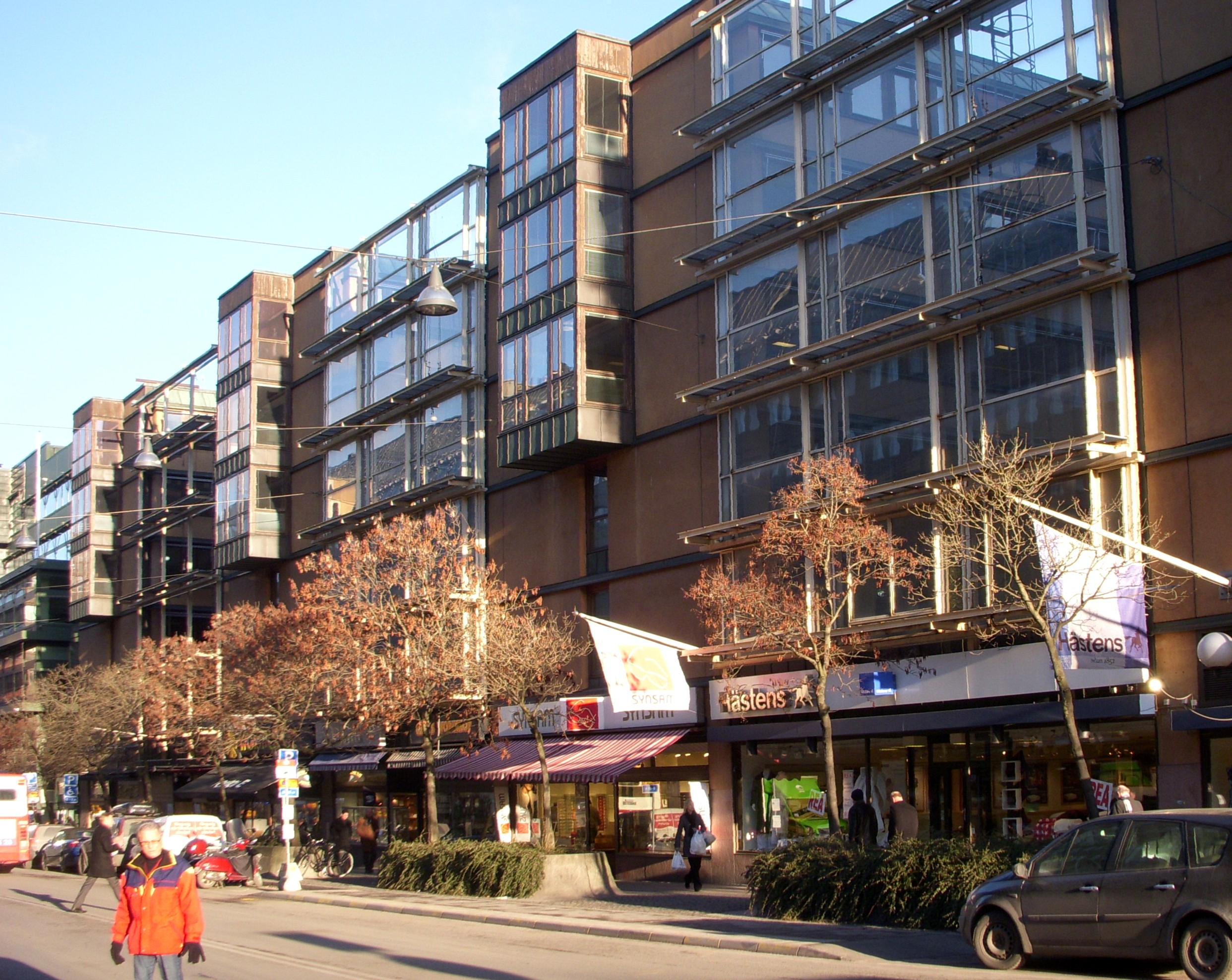 Sparbankshuset i Stockholm, fasad mot Regeringsgatan